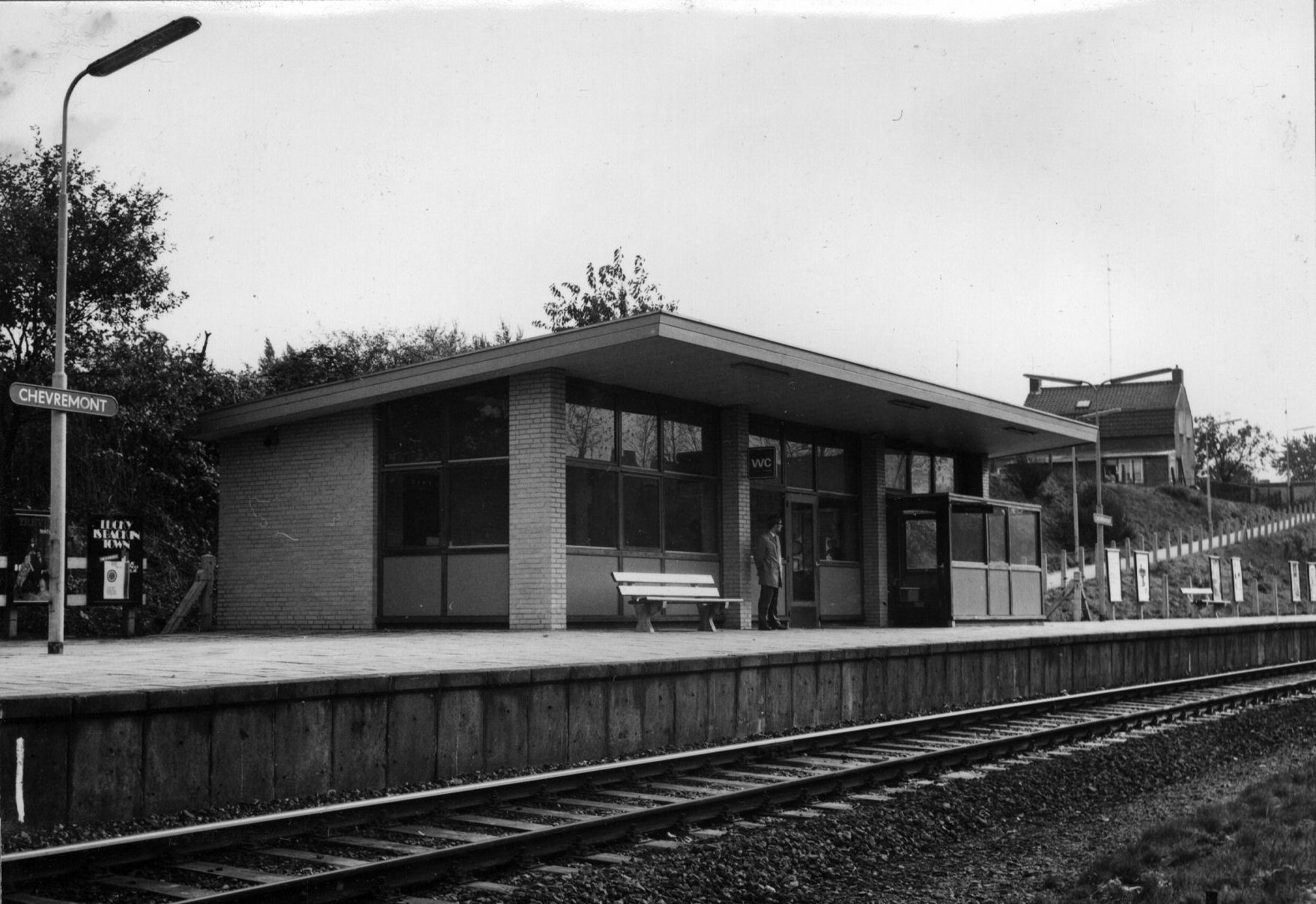 Gezicht op de perronzijde van het N.S.-station Chèvremont te Kerkrade. Het Utrechts Archief - Catalogusnummer: 153034